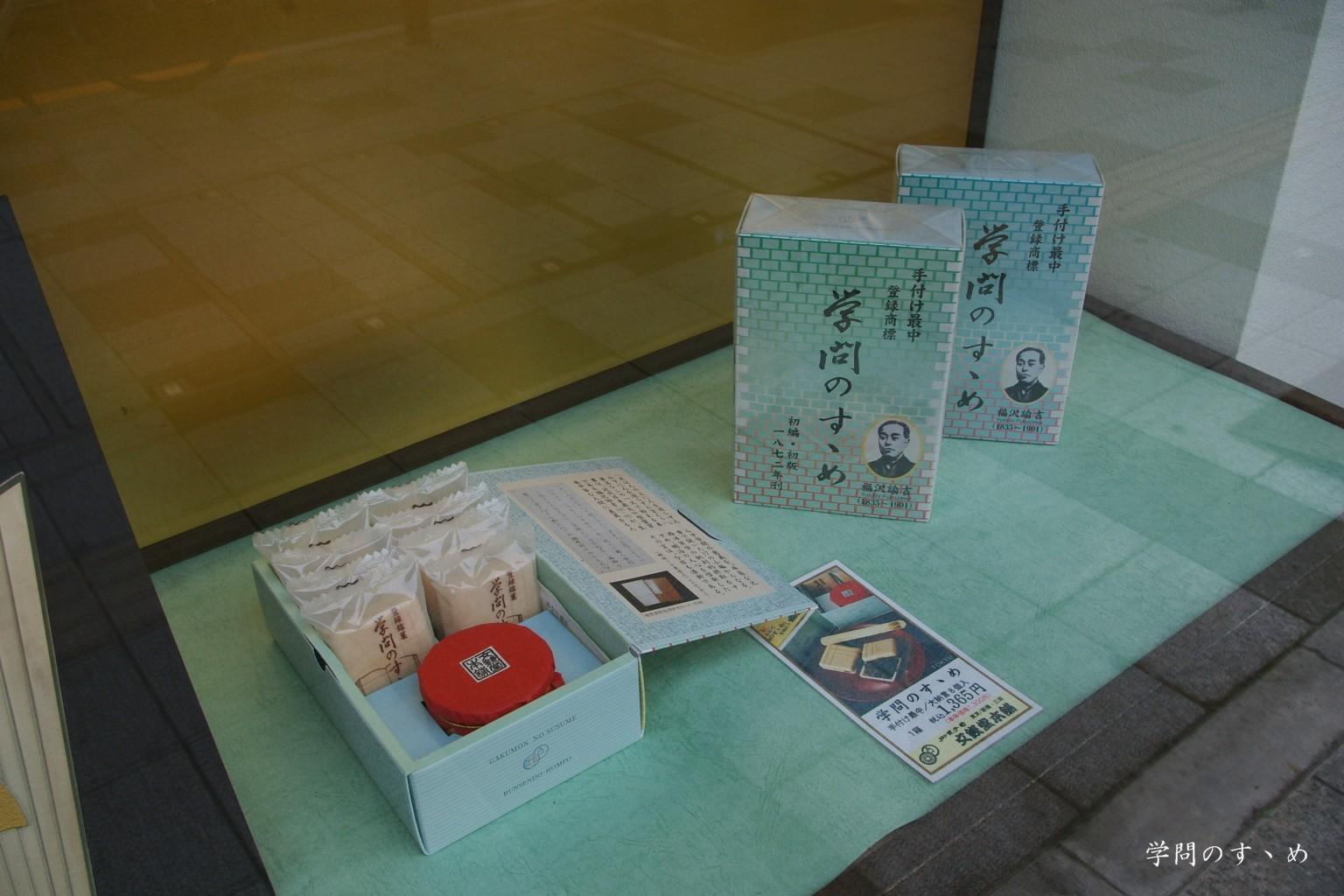 2009.4東京都港区で塾生 (talk)が撮影